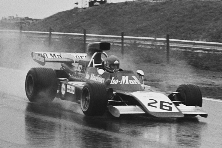 Gijs van Lennep in aktie